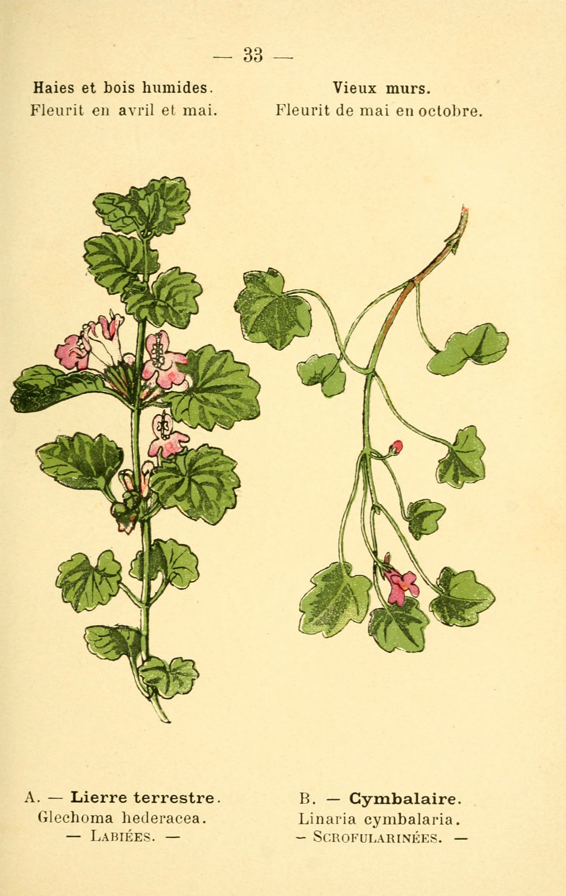 — 33 — Haies et bois humides. Vieux murs. Fleurit en avril et mai. Fleurit de mai en octobre. A. — Lierre terrestre Glechoma hederacea. — Labiées. — B. — Gymbalaire. Linaria cymbalaria. - SCROFULARINÉES.